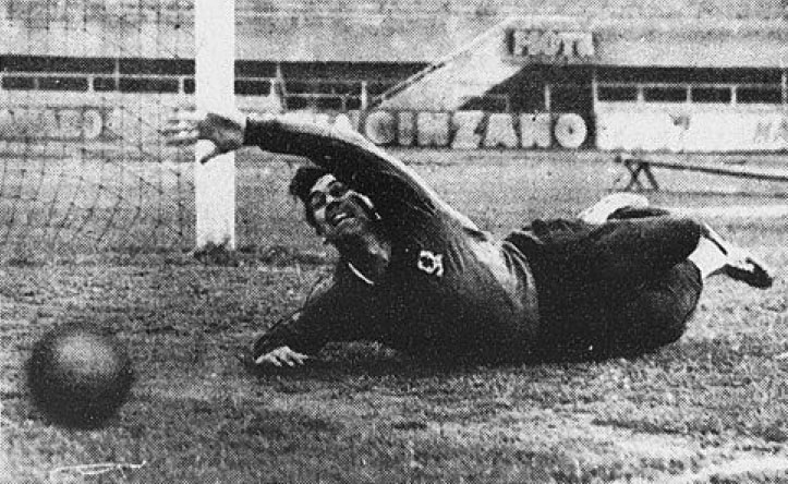 Torino, stadio Comunale, 12 maggio 1959. Il portiere di calcio inglese Nigel Sims dell'Aston Villa, nell'occasione aggregato all'Arsenal (causa infortunio del titolare dei Gunners, Jack Kelsey), in allenamento in vista dell'amichevole del successivo 14 maggio tra la squadra londinese e i padroni di casa della Juventus, questi ultimi poi vittoriosi 3-1.